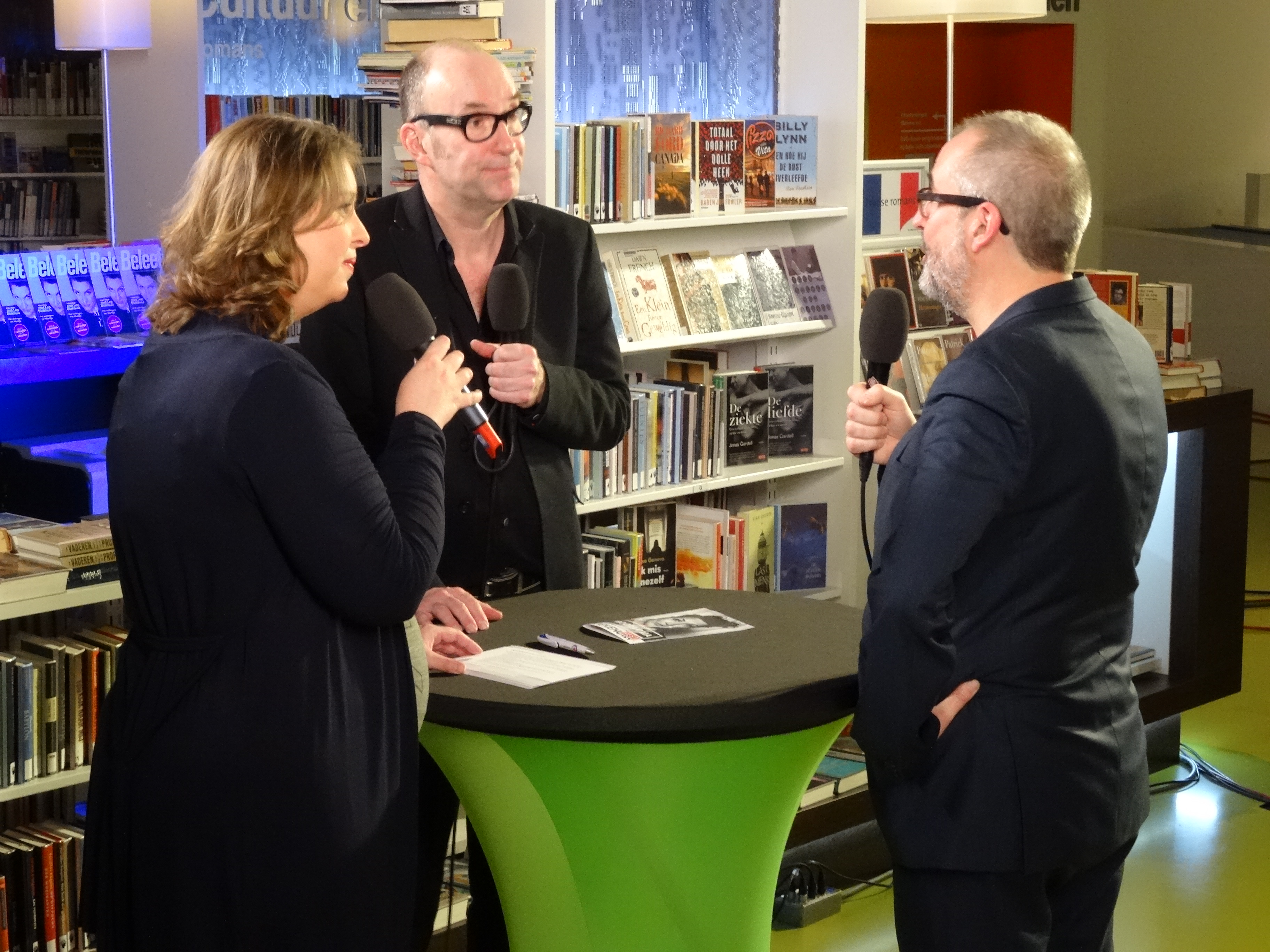 Diana de Groot interviewt Chabot en Giphart tijdens BoekenFEST 2016 in Assen